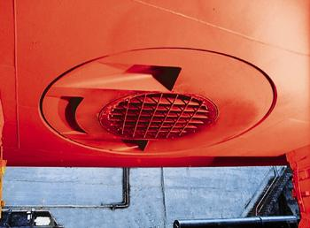 Bodenöffnungen